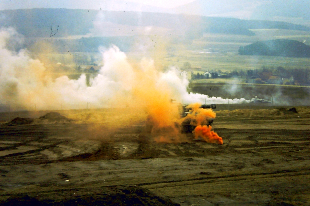 War- Games für die Besucher. Laut war das!